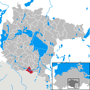 Kieve im Landkreis Müritz, Mecklenburg-Vorpommern